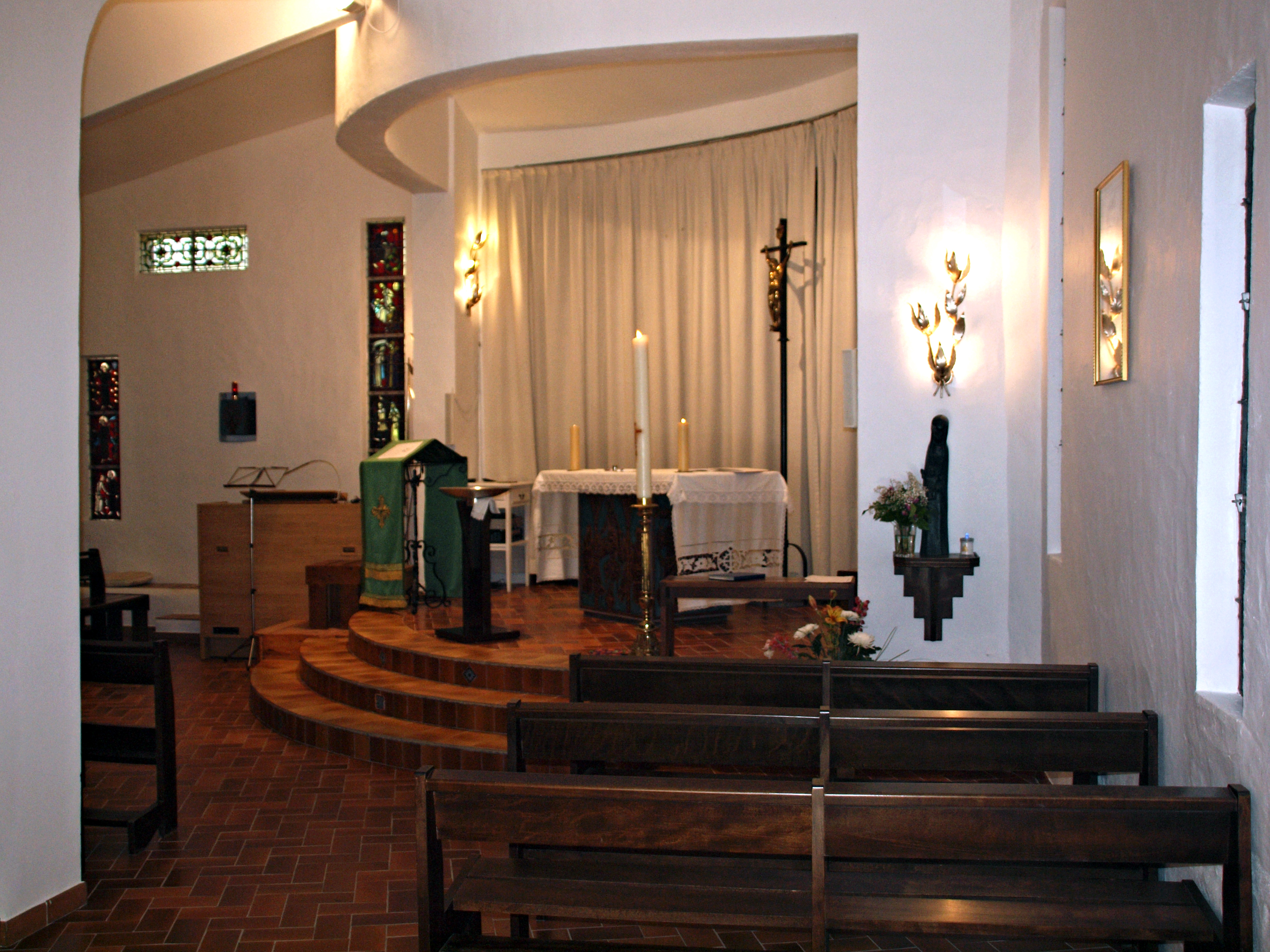 Pietrosella (Corse) - Intérieur de l'église paroissiale Sainte-Monique